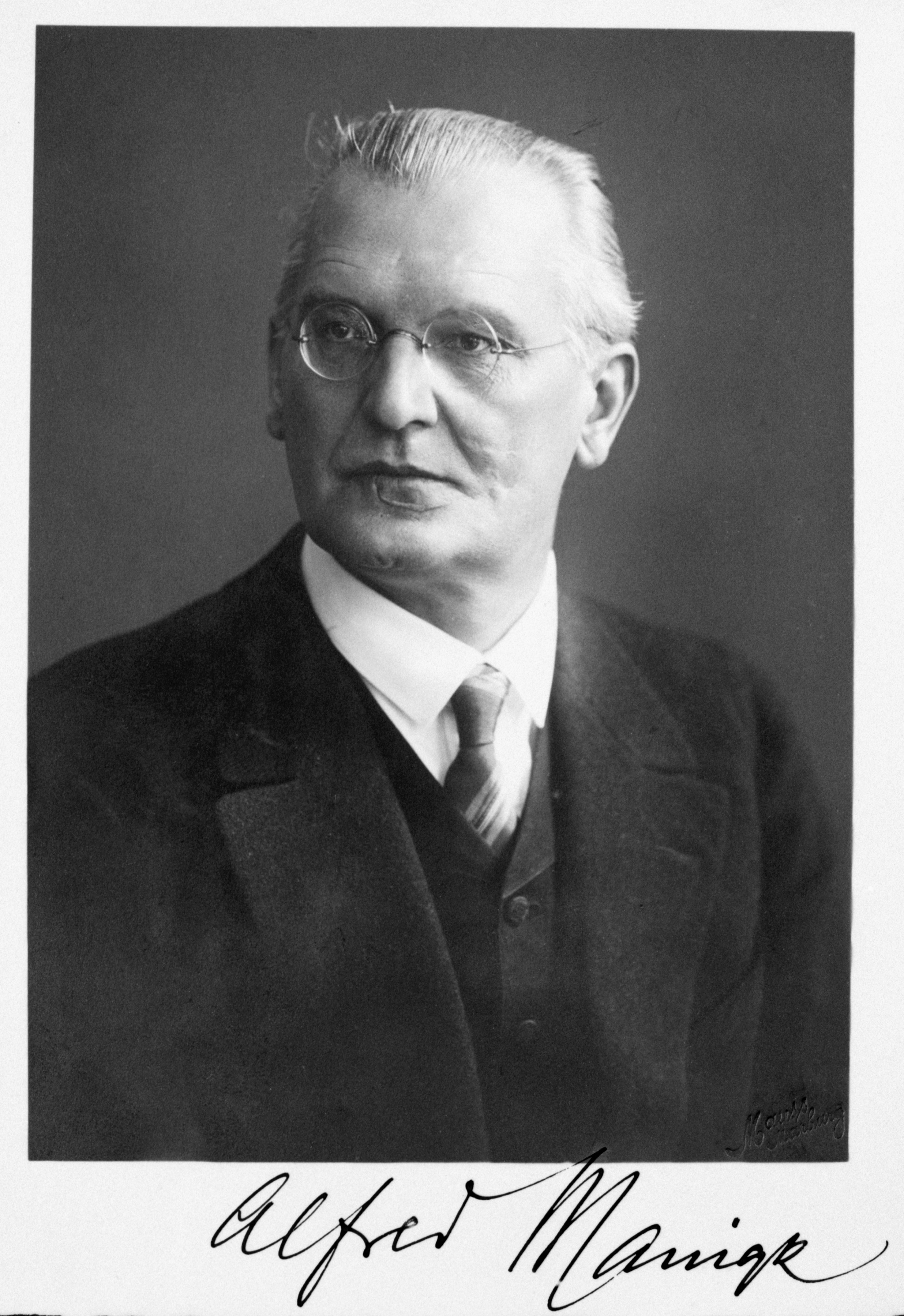 Fotografie von Alfred Manigk